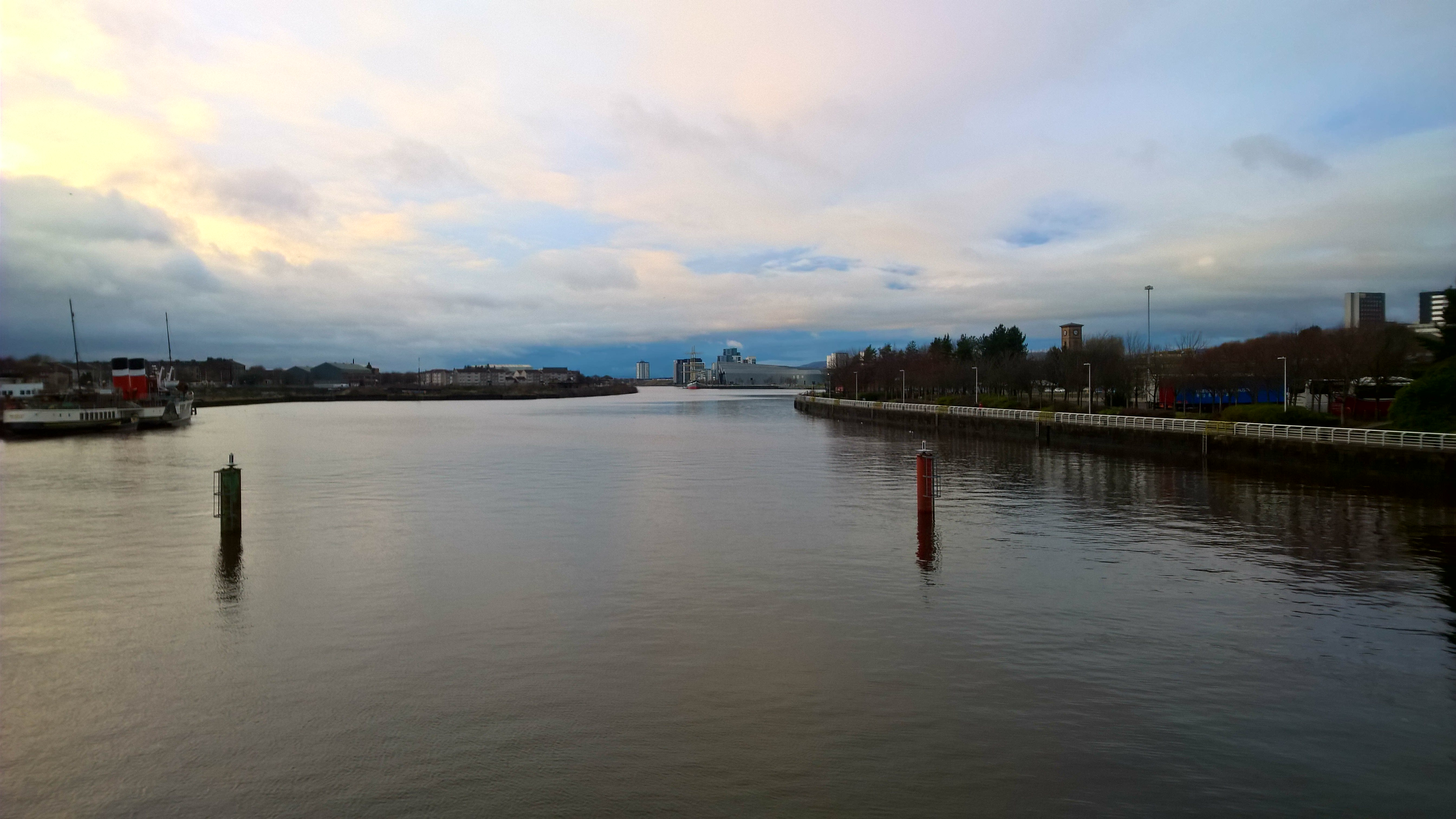 Die Clyderivier in Glasgow teen dawn / River Clyde in Glasgow at dawn